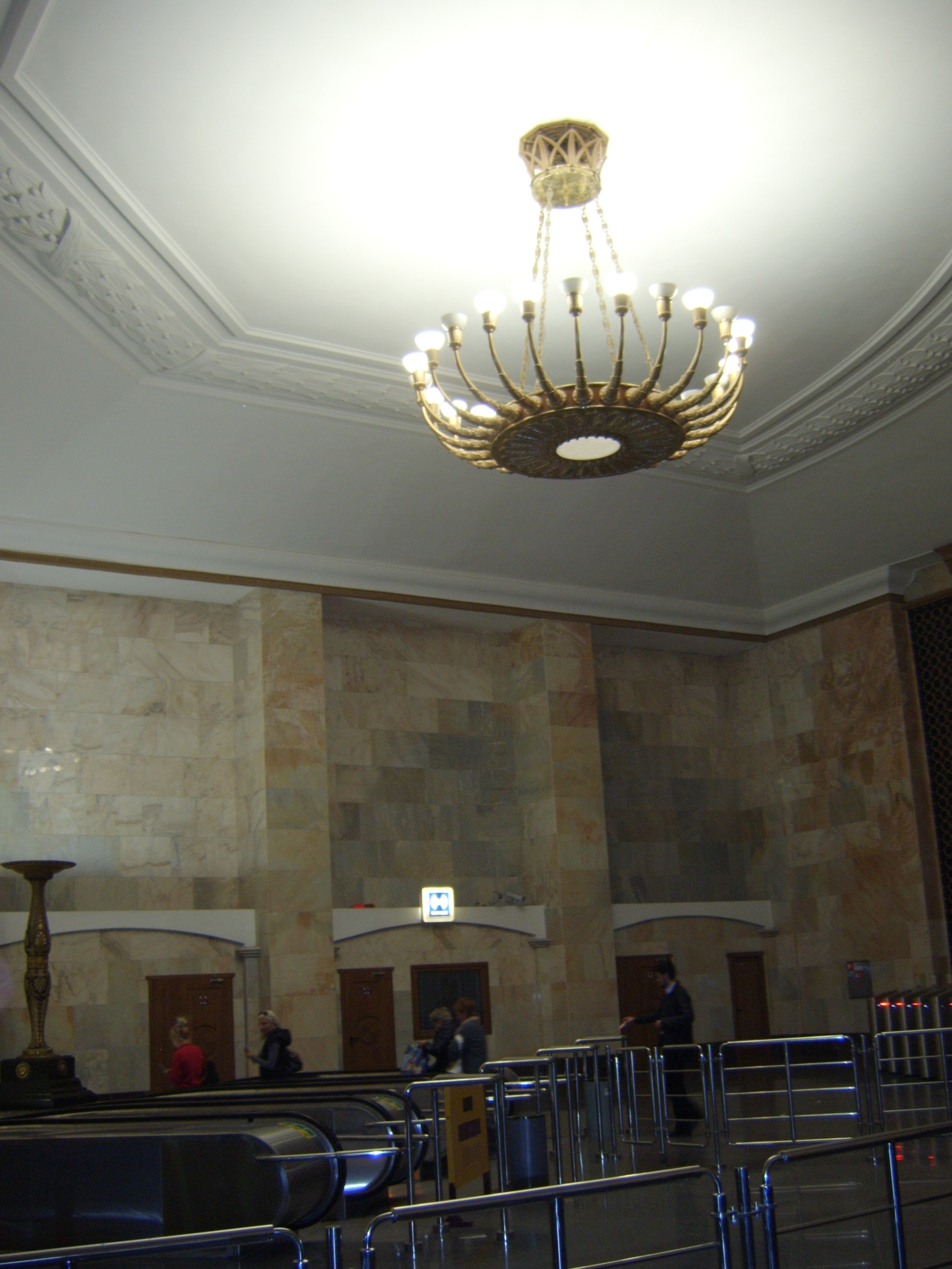 touristenfotos von Moskau